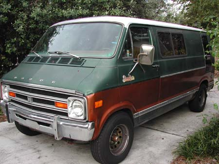 1978 Dodge Street Van driver's side